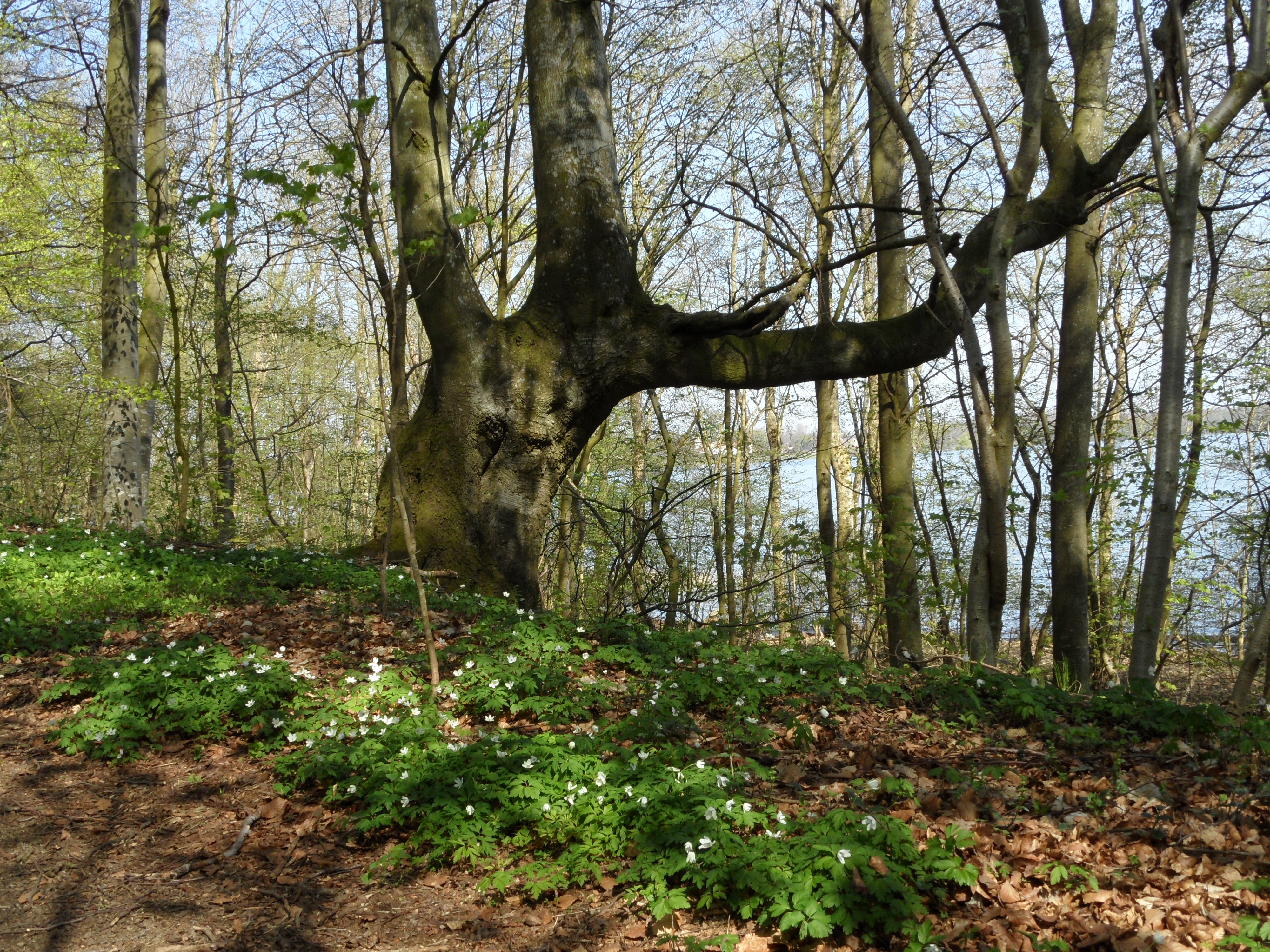 Vitsippor i Klintaskogen